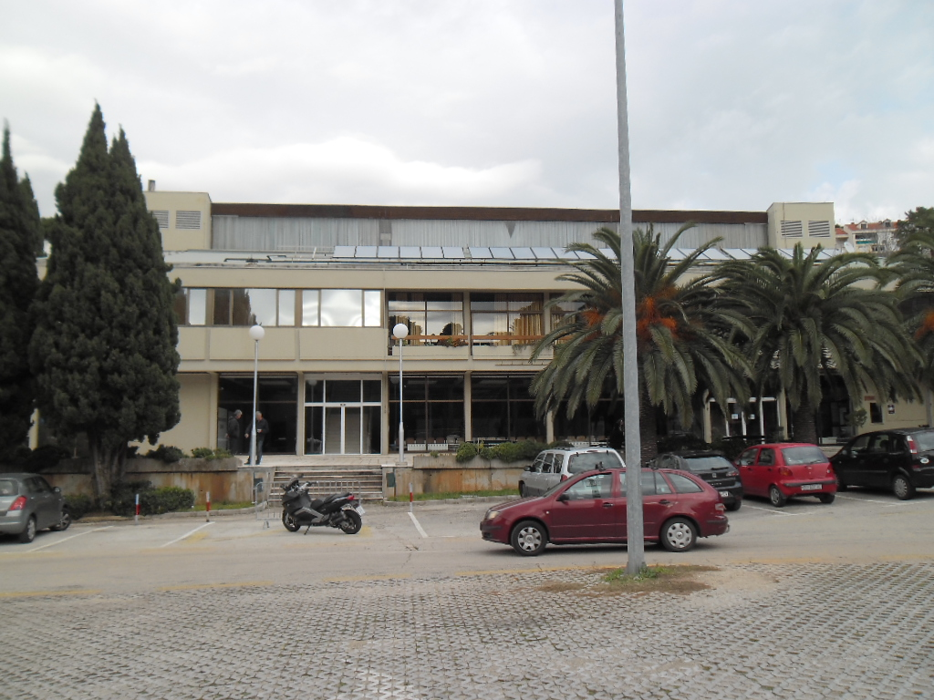 ŠD Gospino polje, Dubrovnik